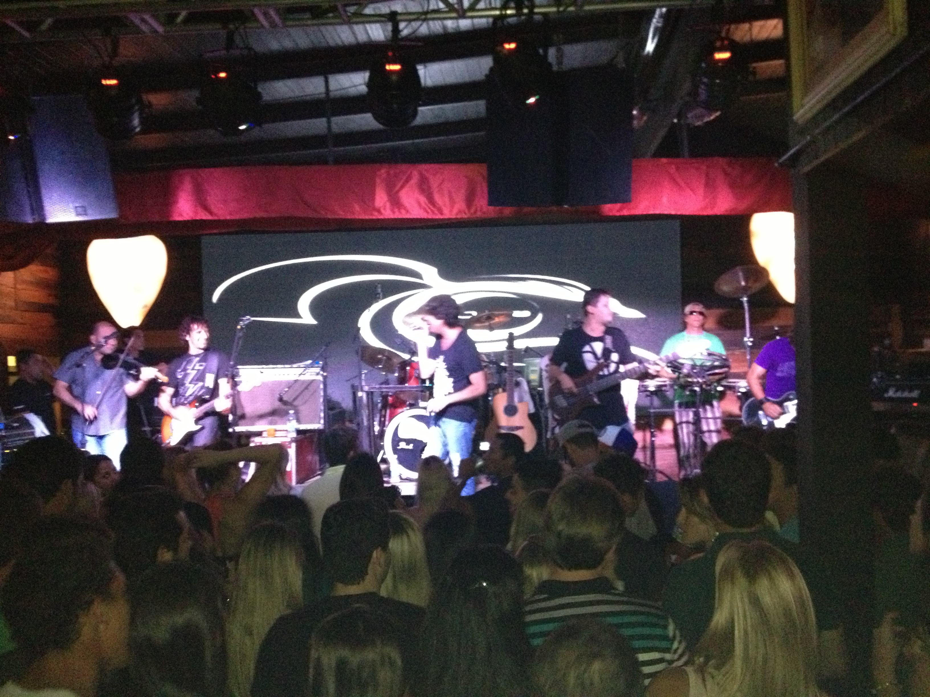 Show do Dazaranha no John Bull Pub em Florianópolis/SC, no dia 3 de janeiro de 2013.